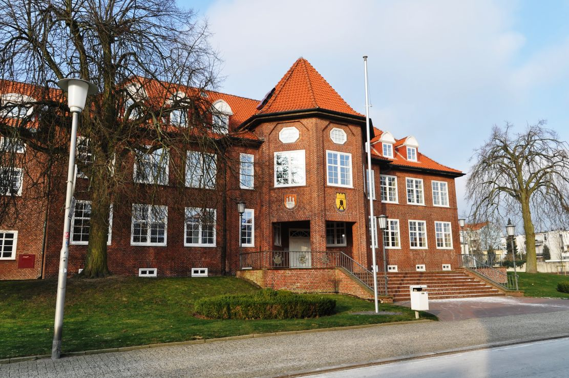 Cuxhaven 2014